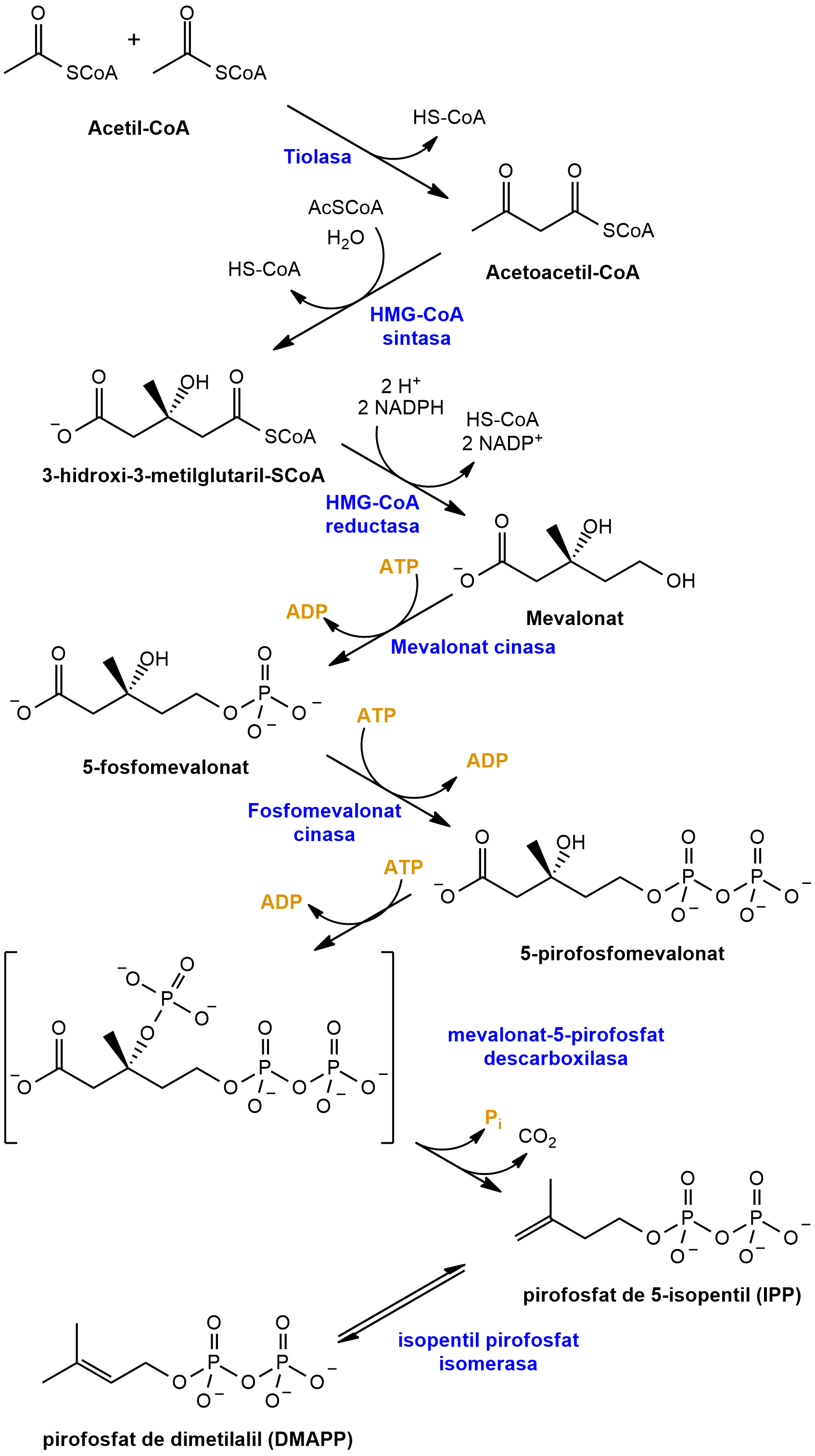 Ruta del mevalonat. En blau, els enzims que intervenen en el procés.